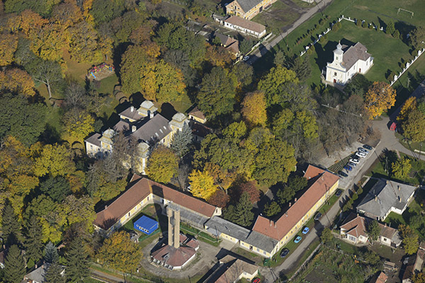 A Dőry-kastély és környéke a magasból